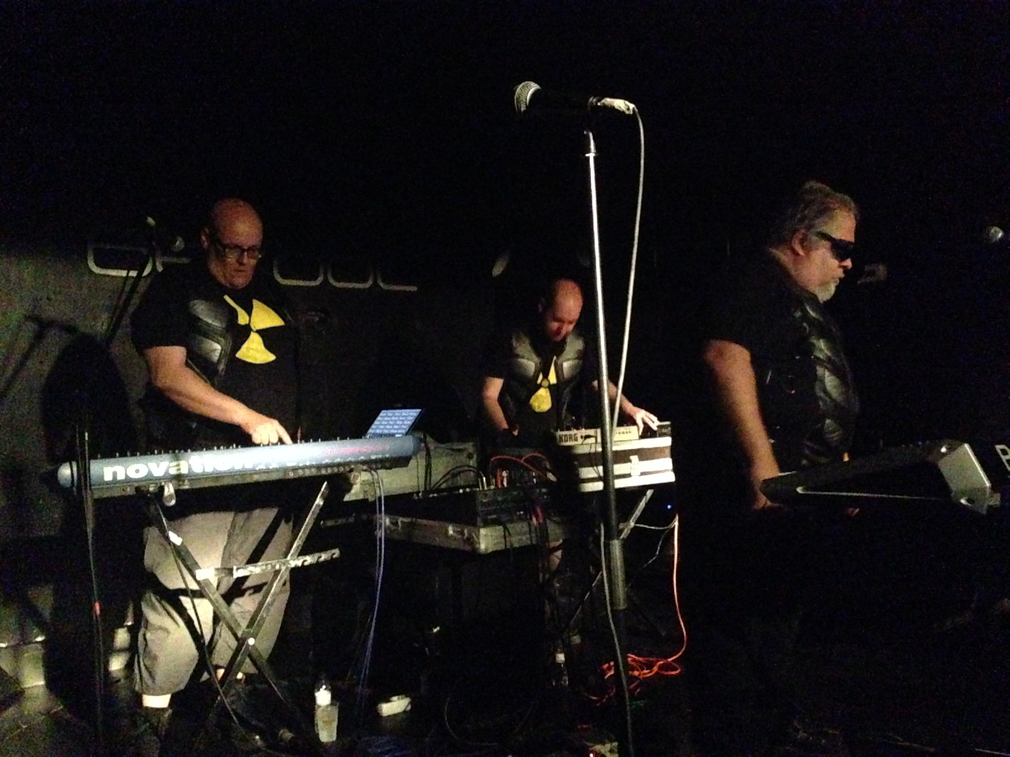 Concierto en la Sala Be Cool de Barcelona